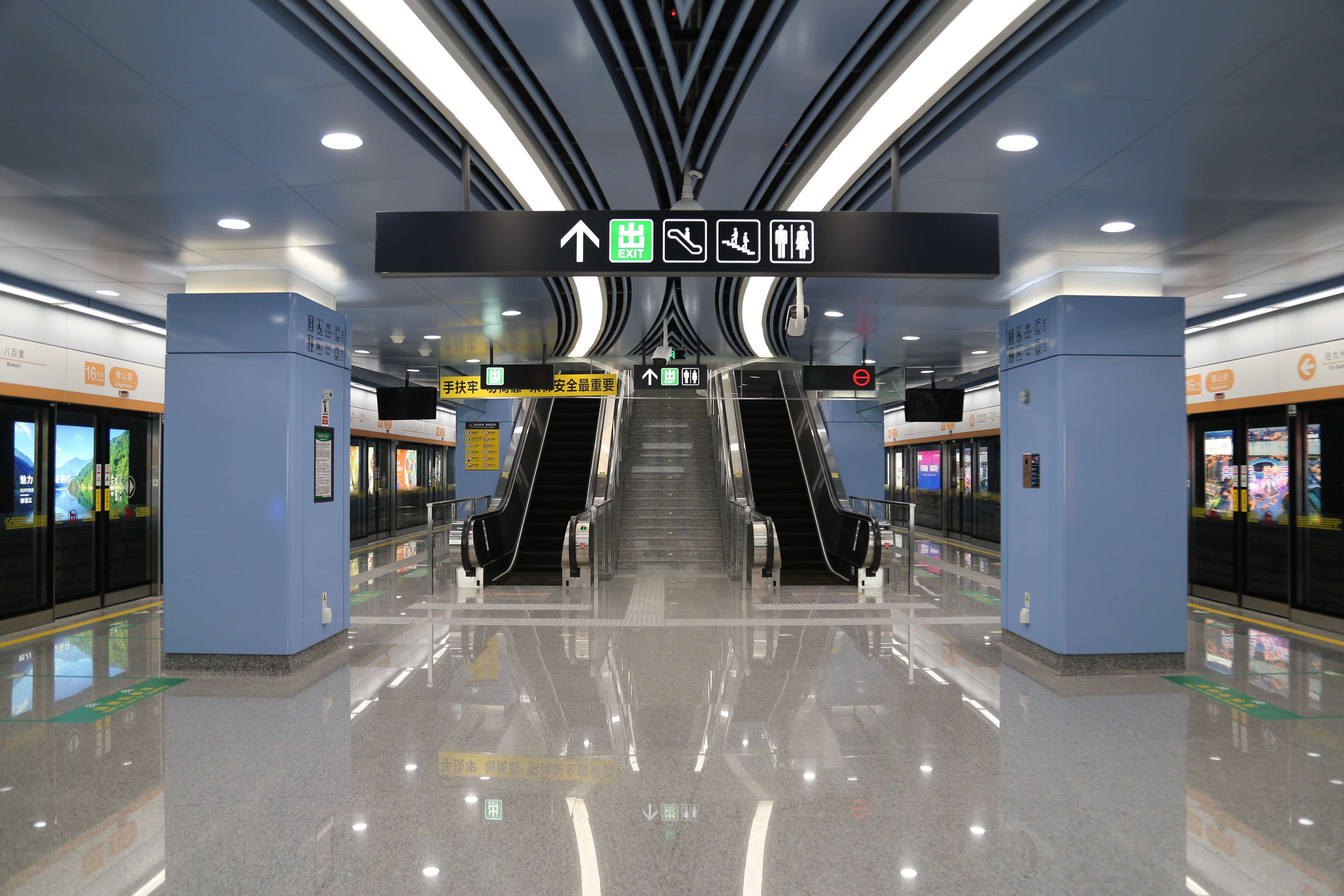 青山湖站站台